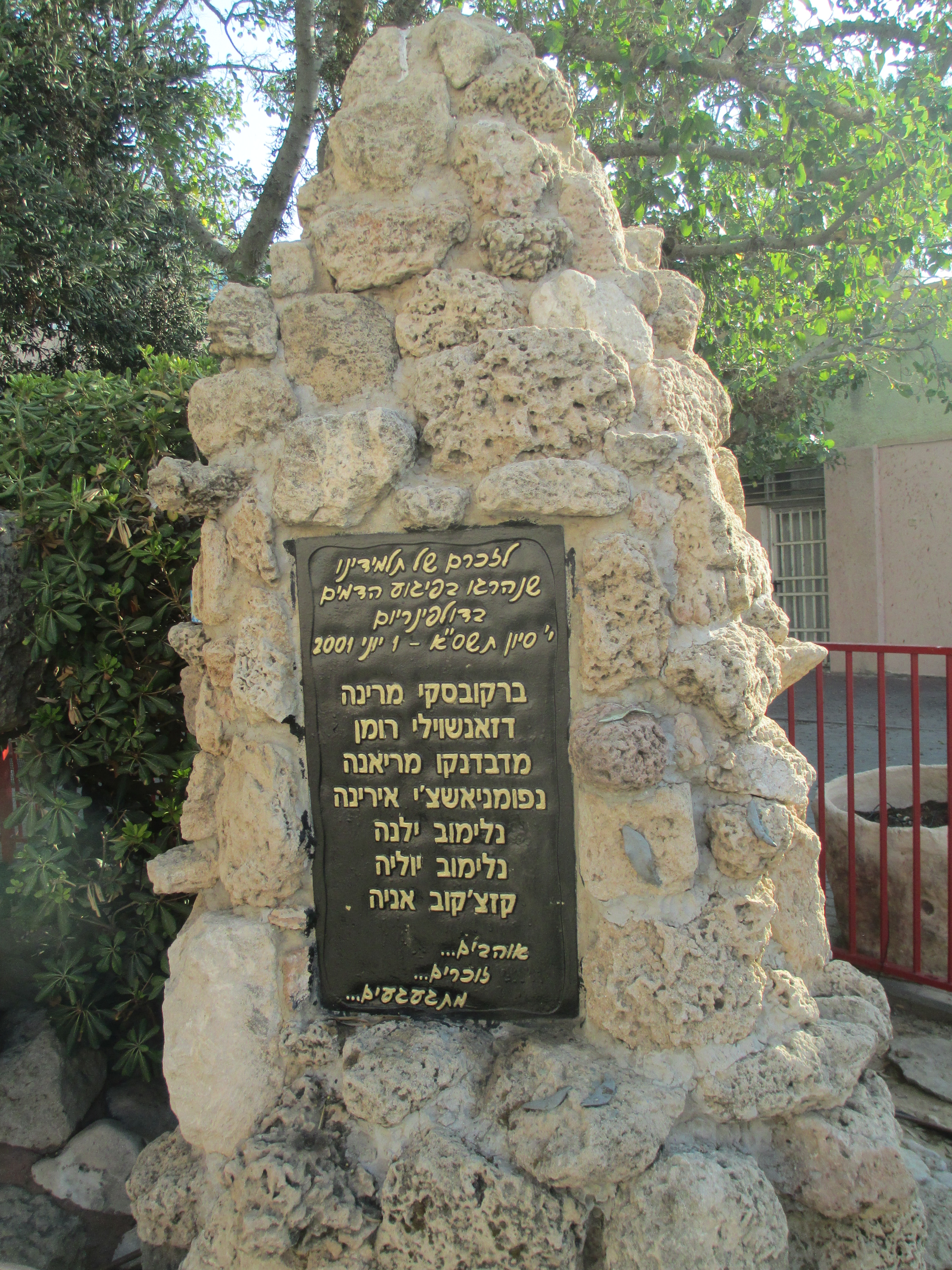 אנדרטה בבית הספר שבח מופת לתלמידים שנספו בפיגוע בדולפינריום